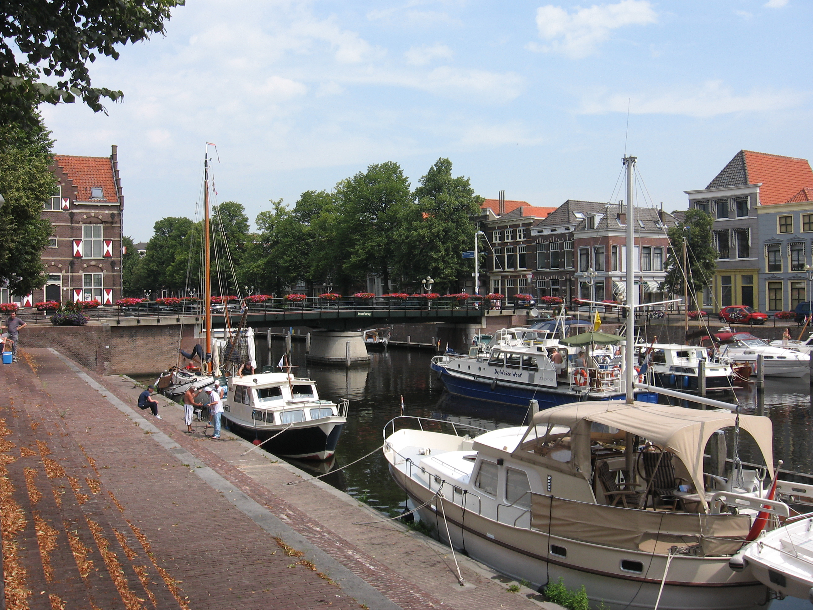 Zicht op een deel van de haven van Gorinchem, gelegen nabij de binnenstad van Gorinchem